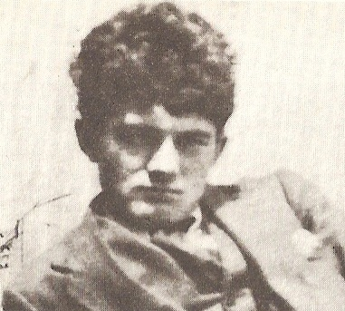 Painter Mark Gertler.